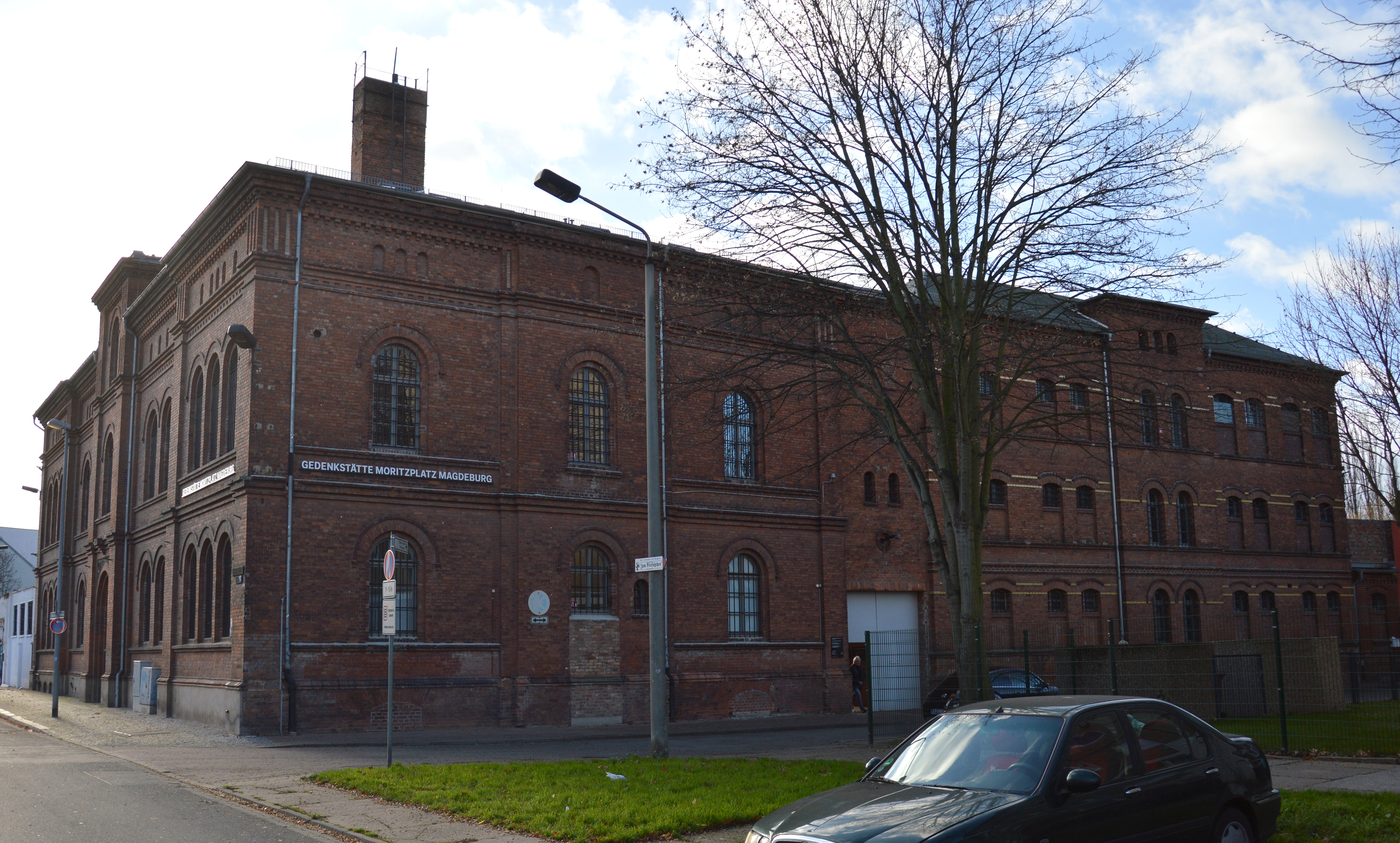 Gedenkstätte in der Umfassungsstraße